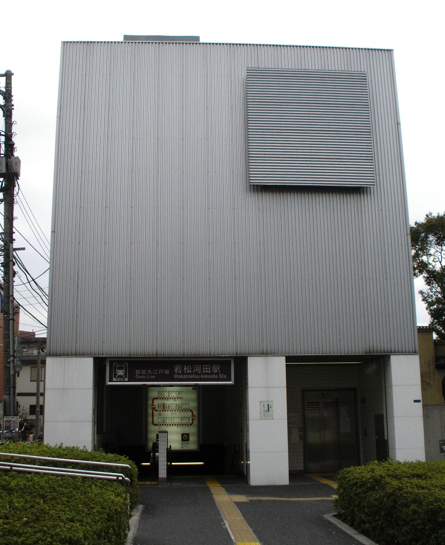 Kawada exit, Wakamatsu-Kawada Station